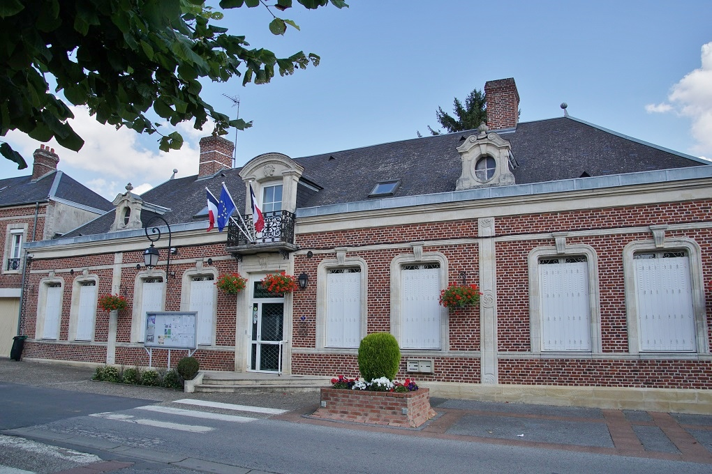 la Mairie